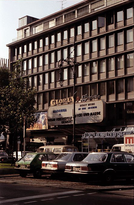 Der Gloria-Palast am Kurfürstendamm in Berlin